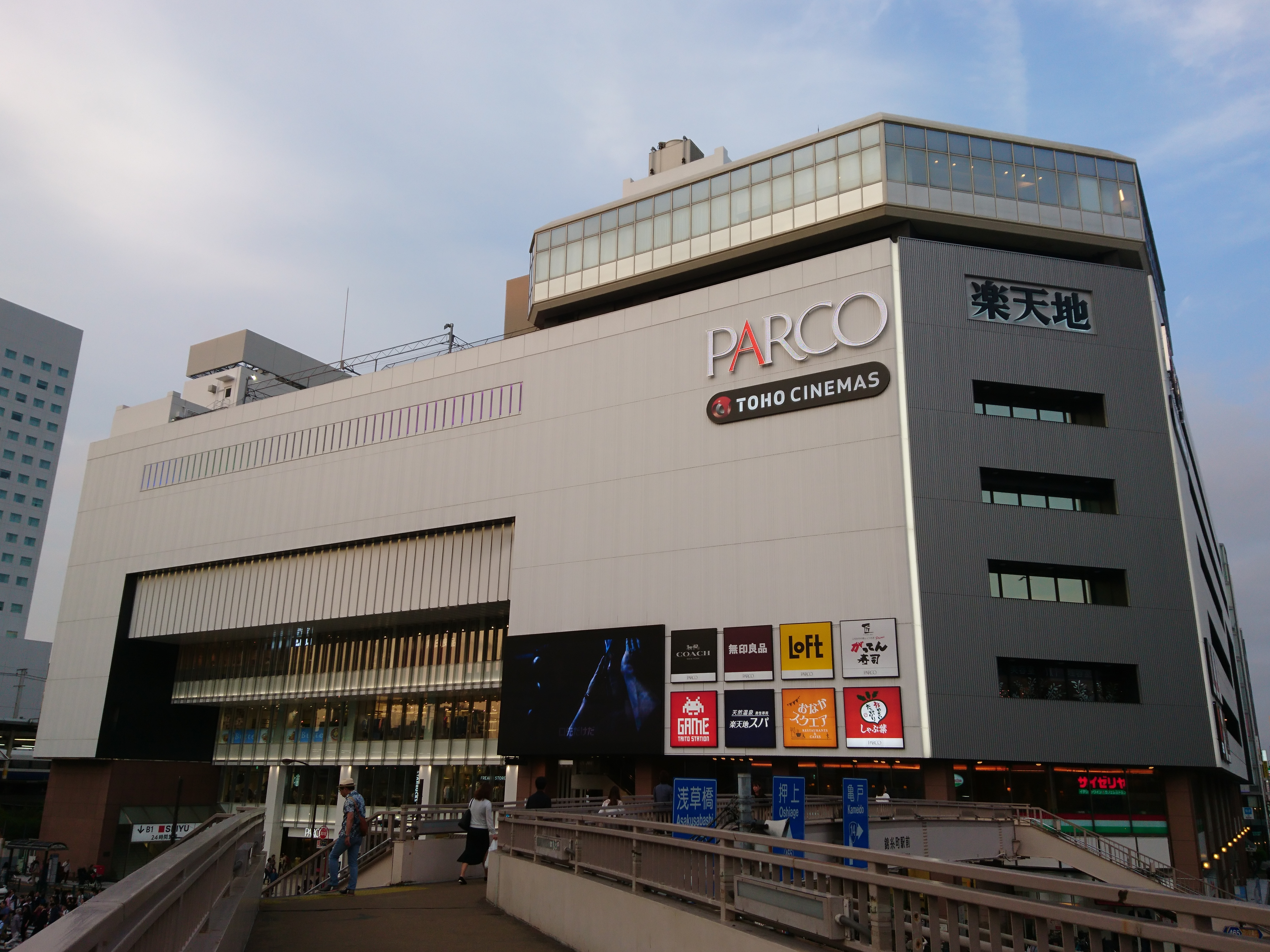 錦糸町PARCO 2019年6月1日撮影